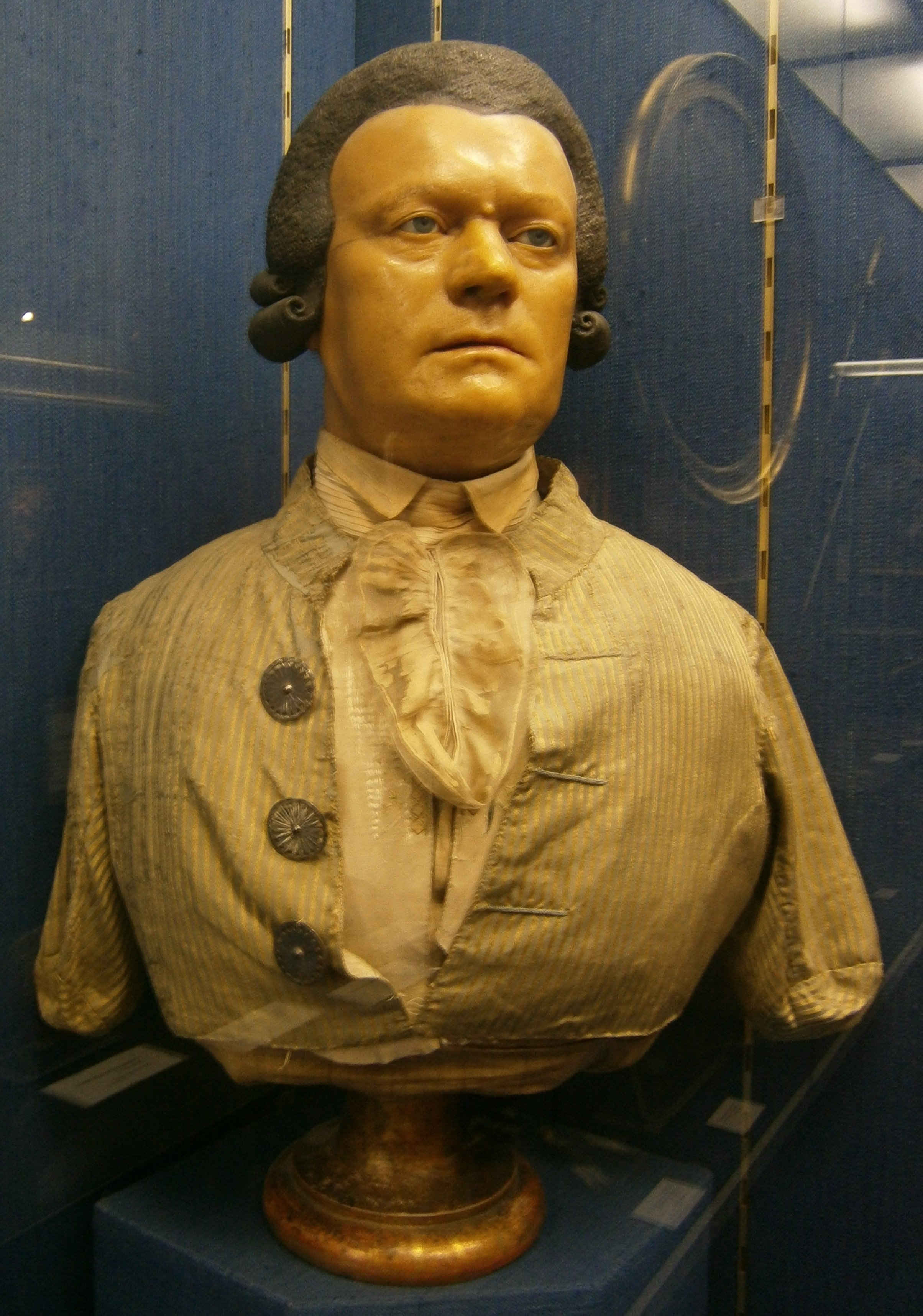 Autoportrait présumé de Curtius.